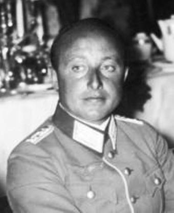 Hans Seidemann